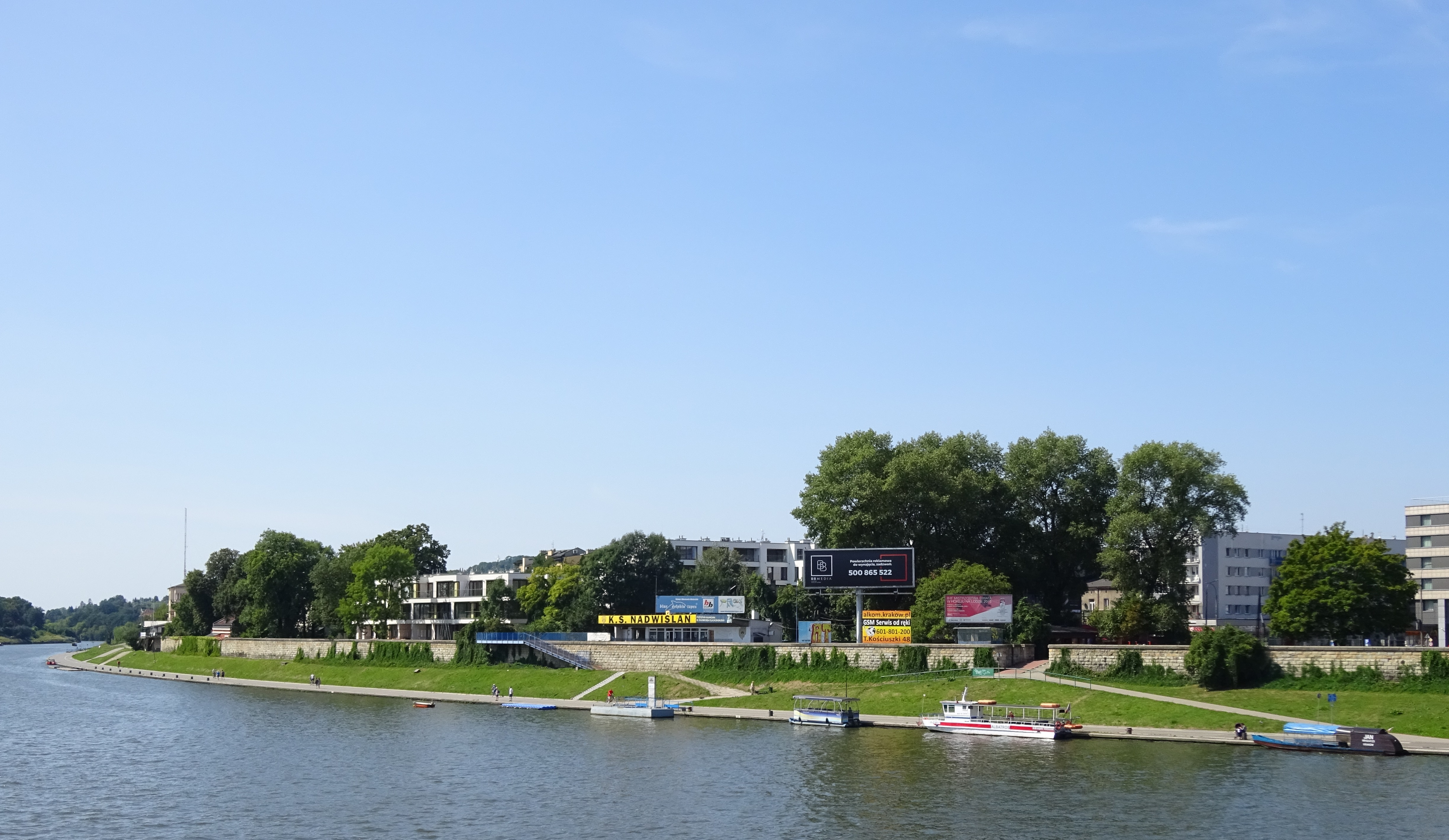 Bulwar Rodła w Krakowie. Widok z Mostu Dębnickiego. 2017